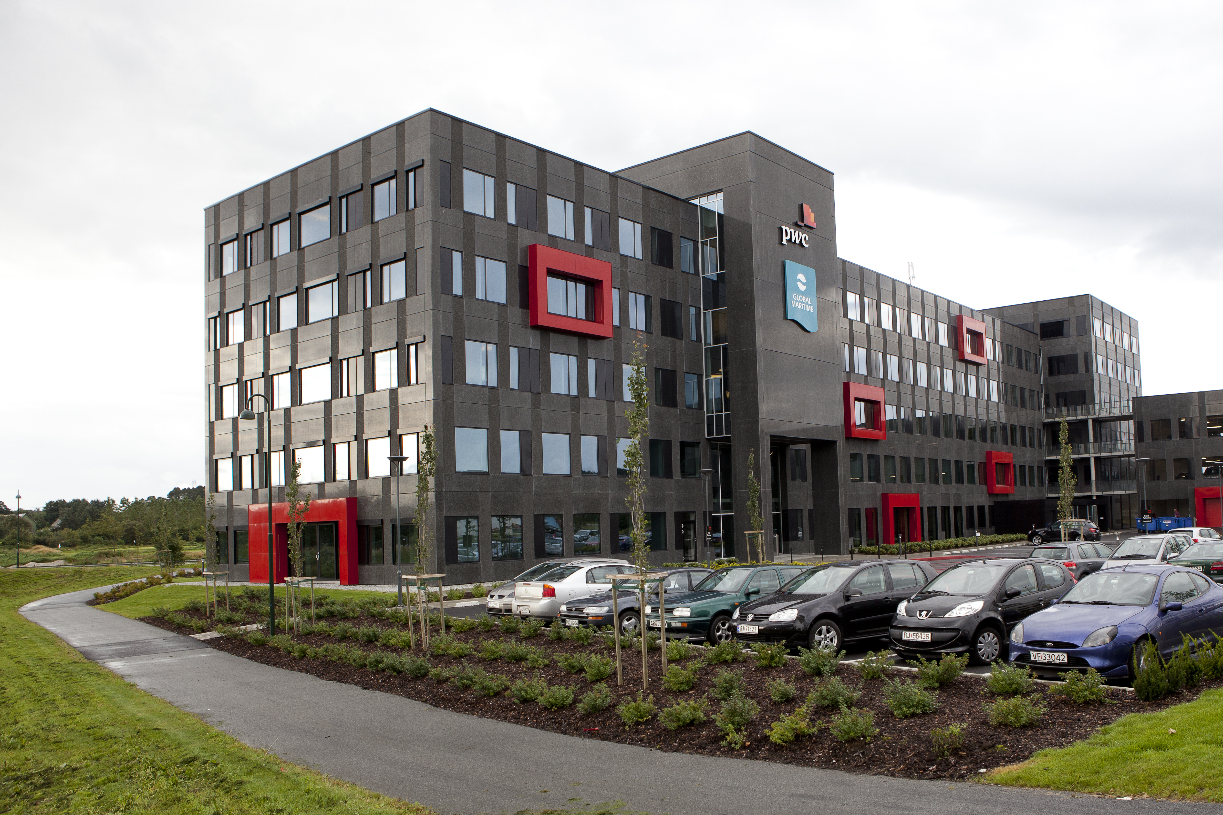 PwCs bygning i Stavanger